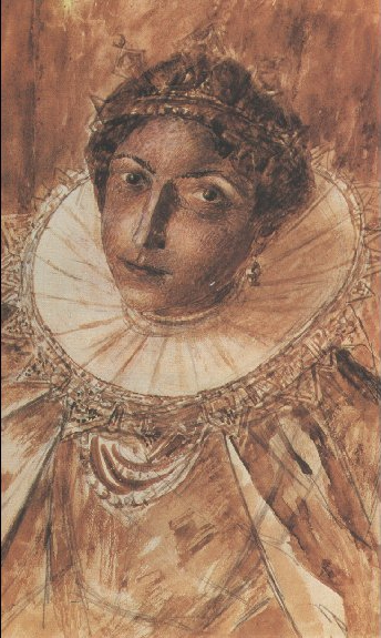 Эскиз грима Марины Мнишек к трагедии А.С.Пушкина "Борис Годунов" Из собрания Санкт-Петербургского государственного музея театрального и музыкального искусства